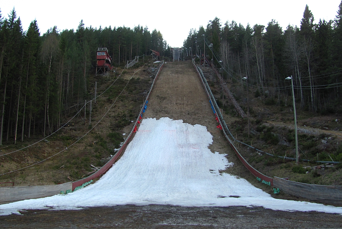 Tveitanbakken, K90 set fra landingsstedet.